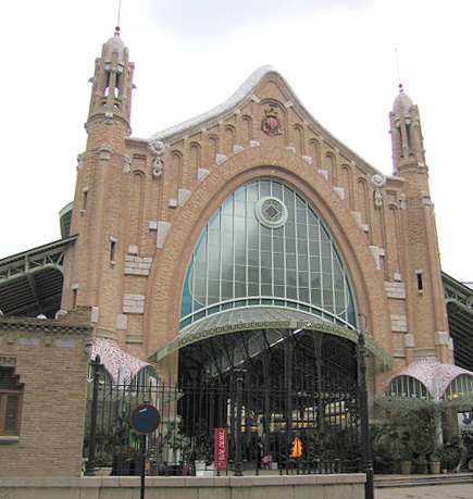 Façana del Mercat de Colom, c/ comte salvatierra (València)